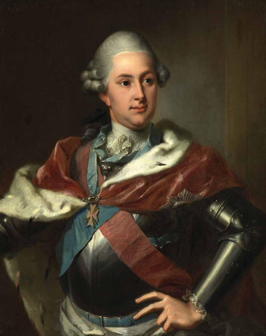 Erbprinz Wilhelm von Hessen-Kassel (1743-1821)